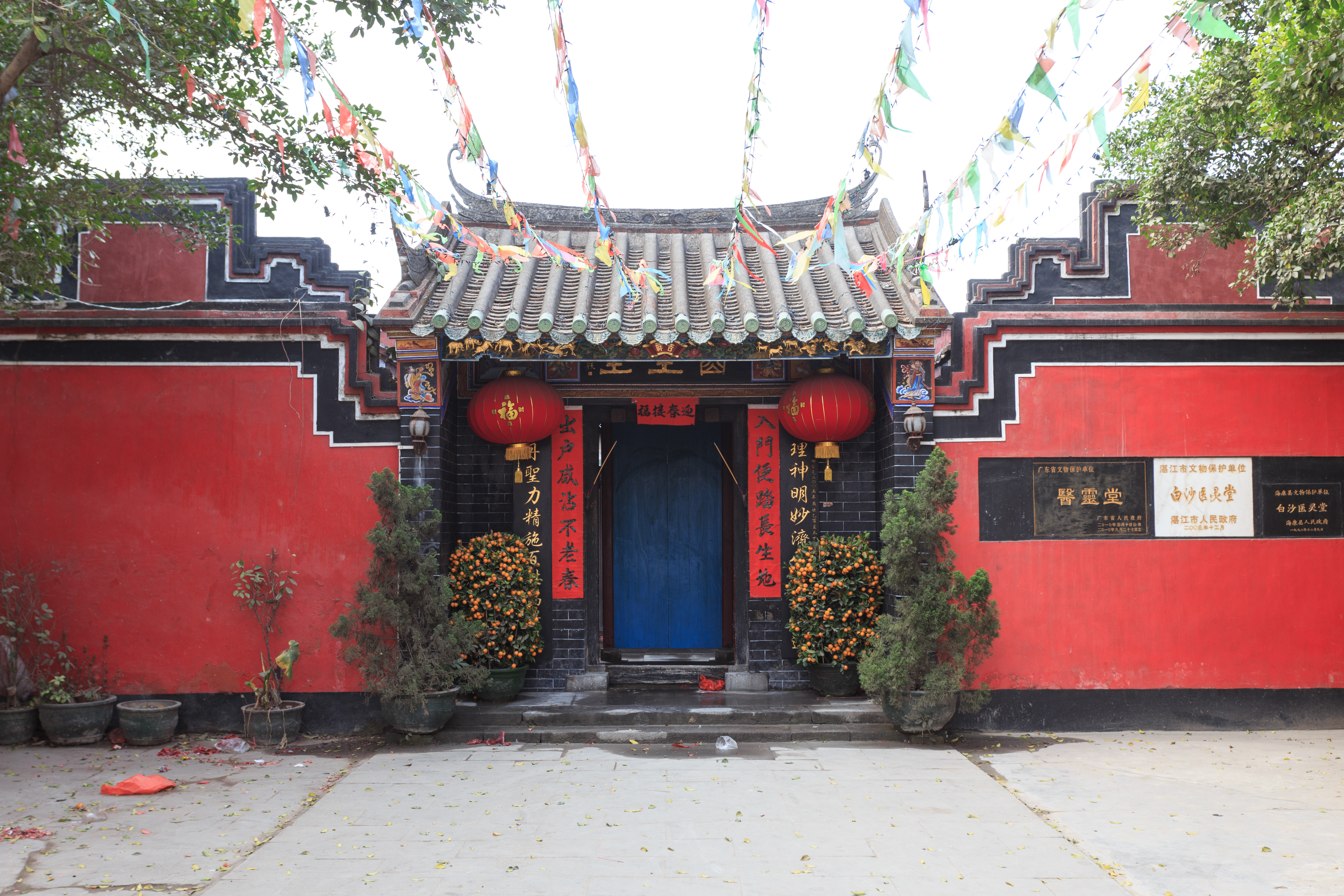 雷州白沙医灵堂